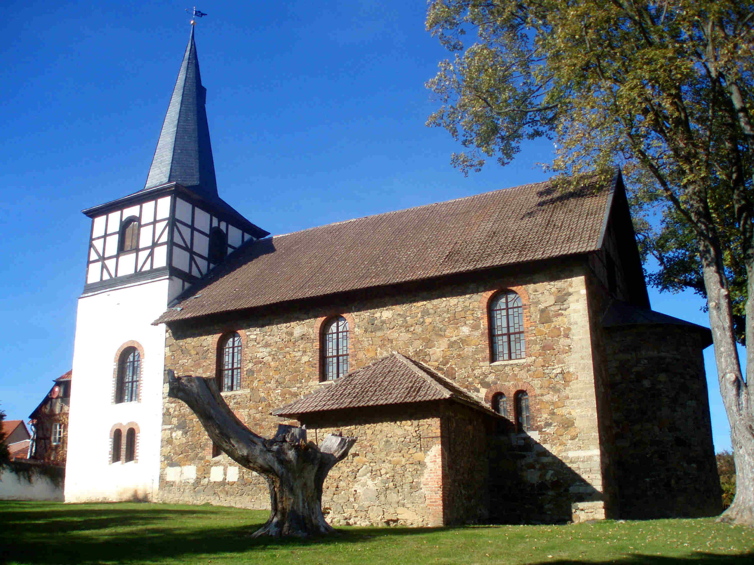 St. Johanniskirche Pansfelde